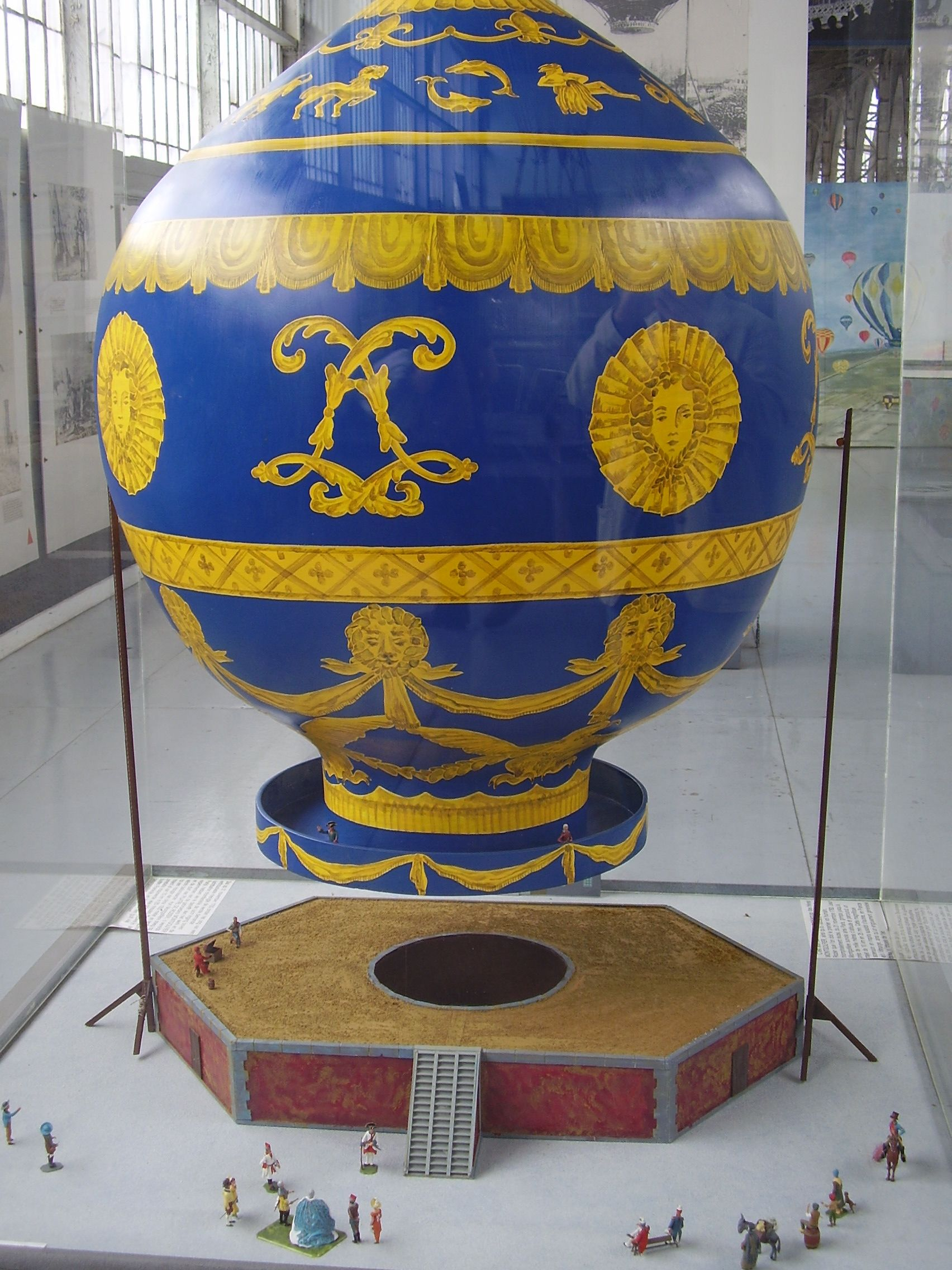 Royal Military Museum Brussels, Musée Royal de l'Armée, Koninklijk Museum van het Leger en de Krijgsgeschiedenis